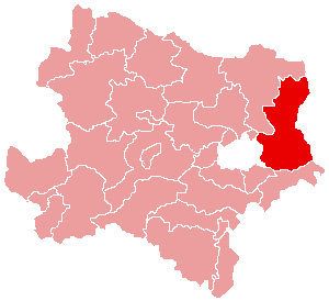 Karte: politischer Bezirk Gänserndorf Lizenz: GNU FDL Quelle: Zeichnung plp Datum: de:2004 Ort: Wien